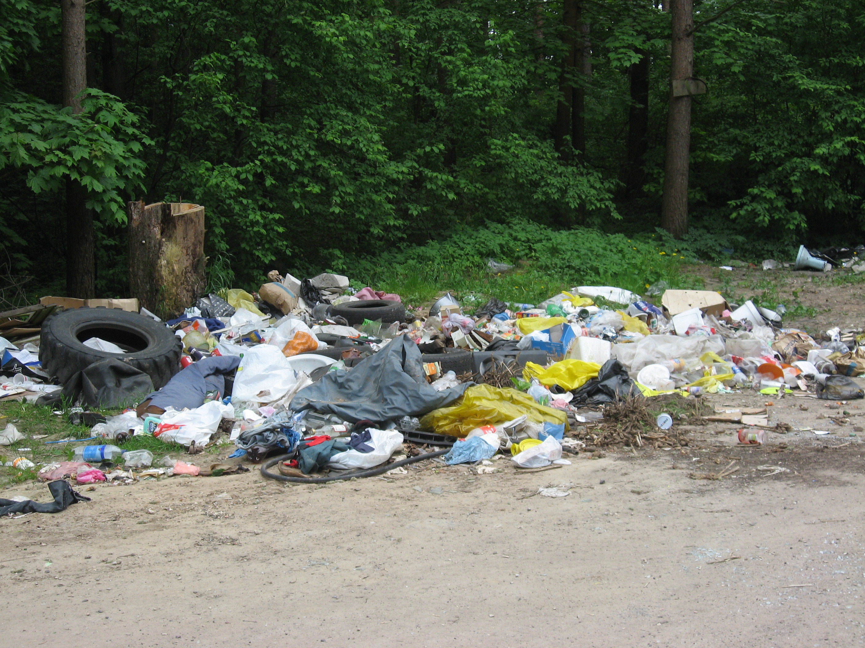 Hromada odpadků v Rize poblíž hranic se Salaspilsem